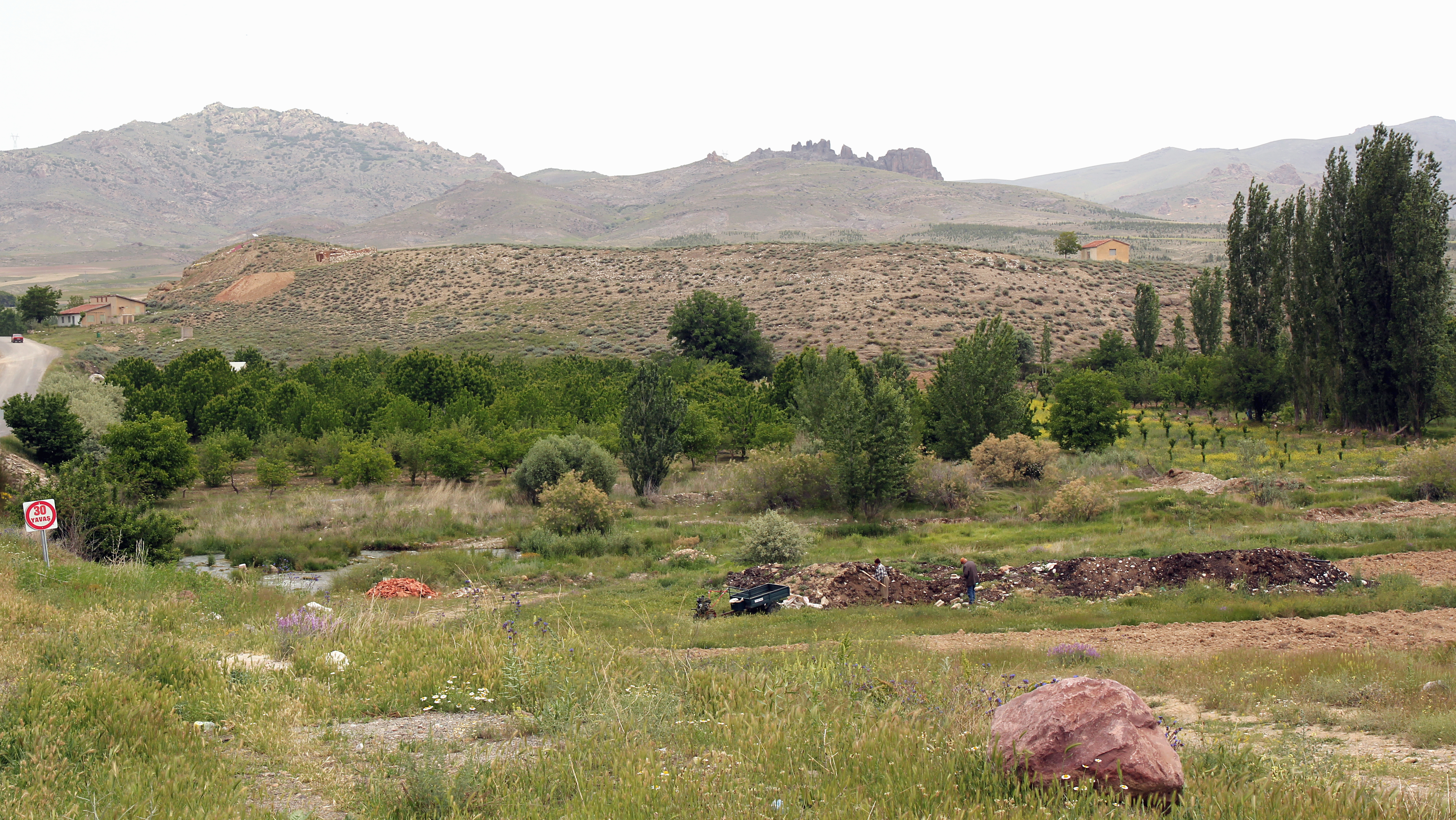 Porsuk Höyük, Siedlungshügel nördlich des Ortes Porsuk im Landkreis Ulukışla der türkischen Provinz Niğde